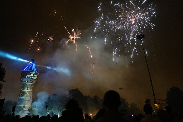 Spectacle pyrotechnique pour les 100 ans du chateau d'eau de Sélestat. Une réalisation de la société molecule (moleculefrance) Projection du dessin original de la coupe du batiment.